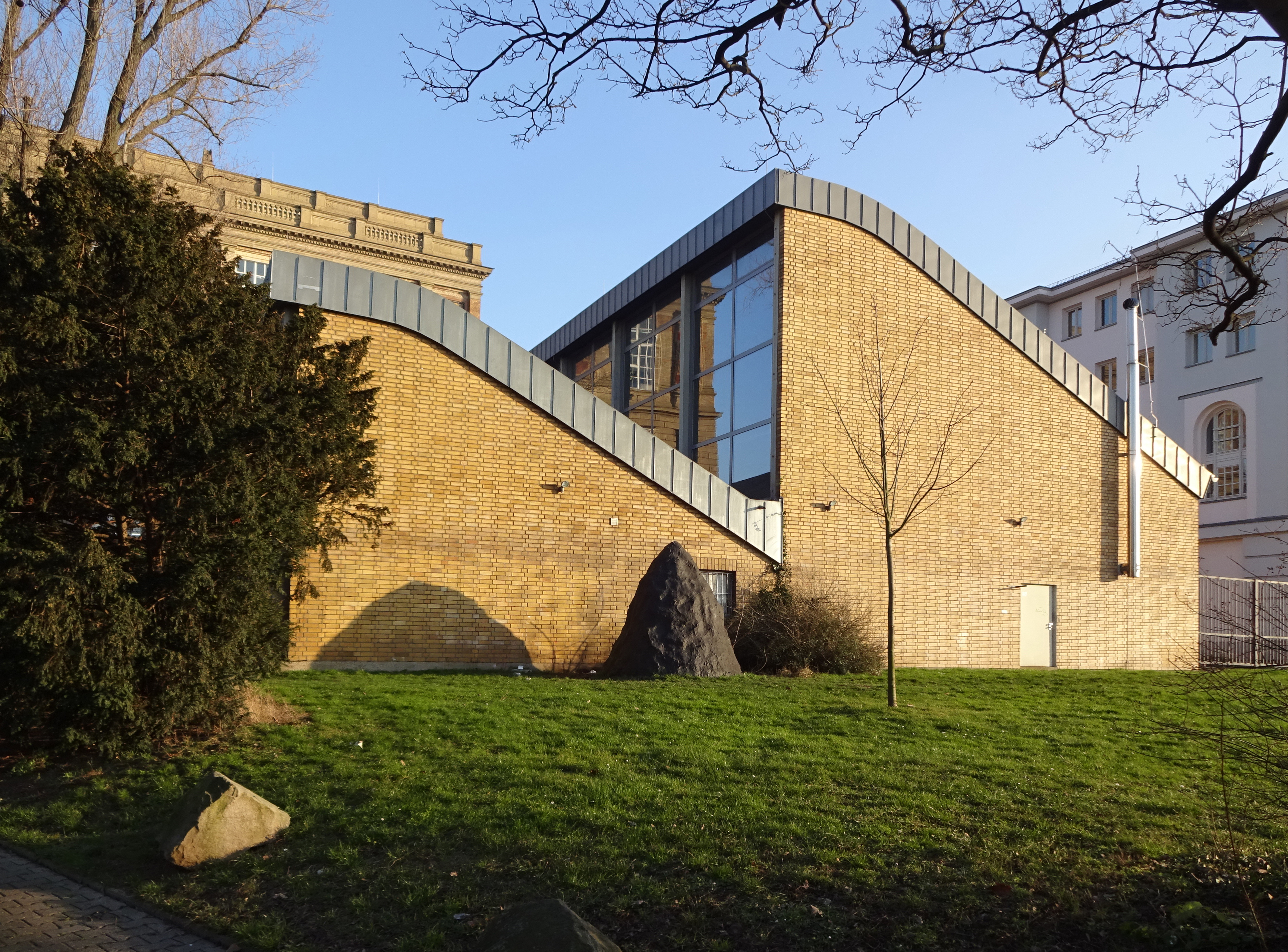 Atelierhaus der Kunstakademie in Düsseldorf-Altstadt, von Westen mit Objekt von Benjamin Houlihan (ohne Titel, 2002)